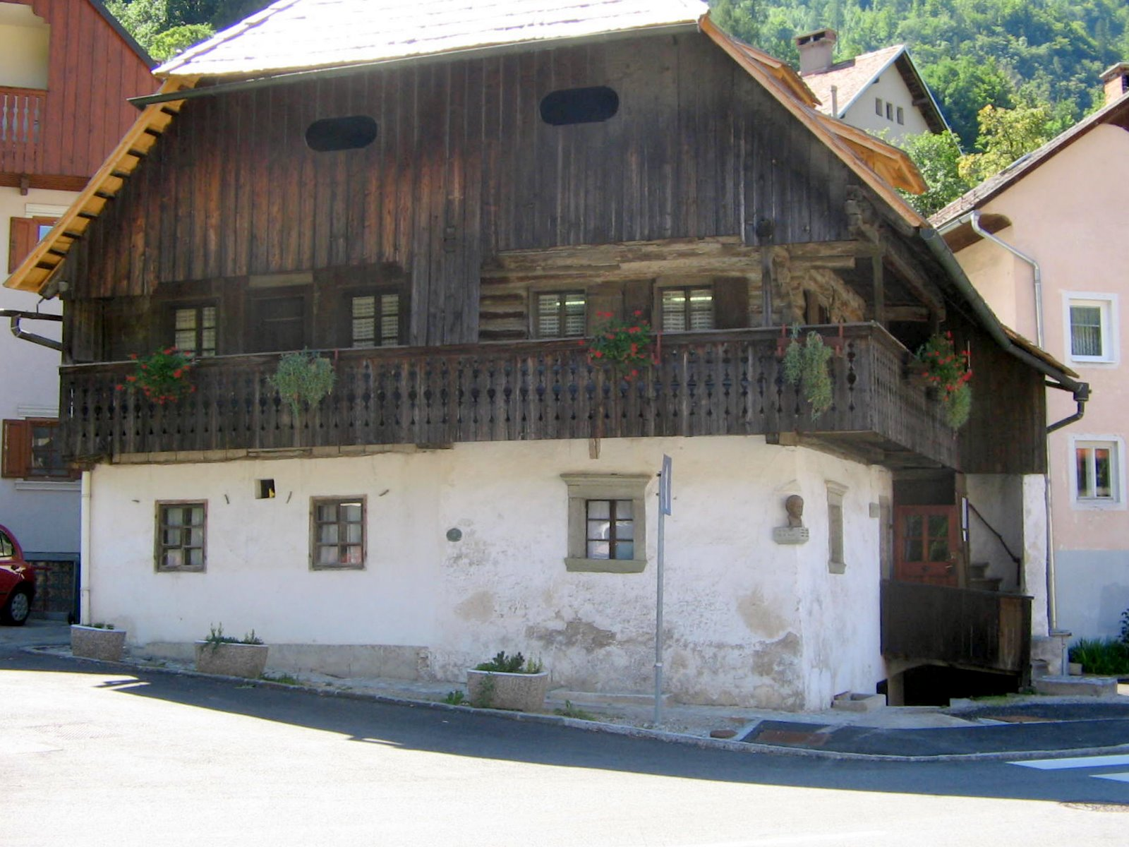 Open air museu, Kurnik House, Tržič, Slovenia